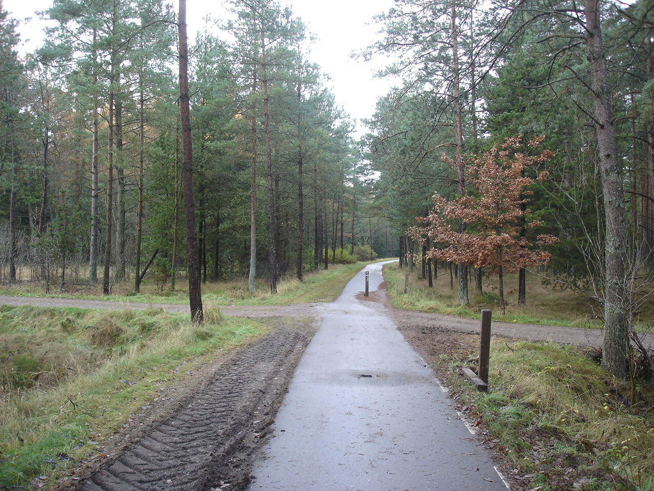 Banestien Resenbro-Silkeborg krydser en skovvej i Silkeborg Nordskov